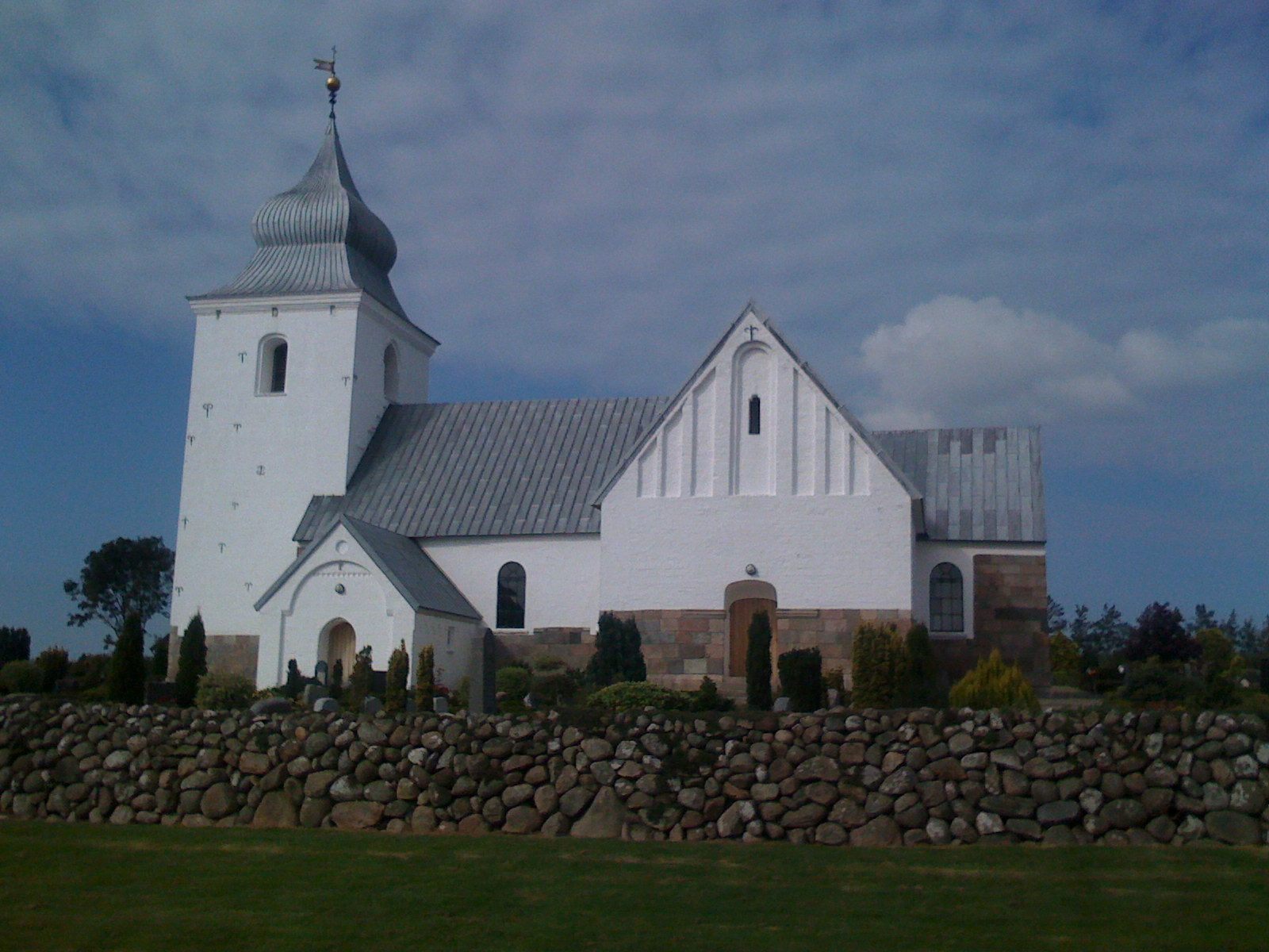 Hjerm Vestre Kirke